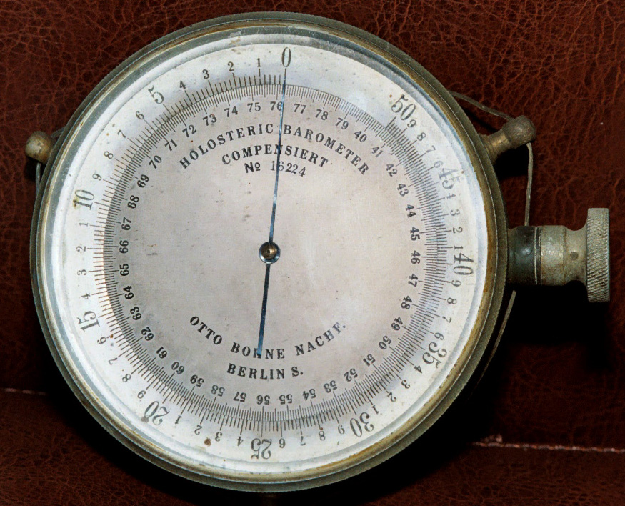 Aneroid barometer